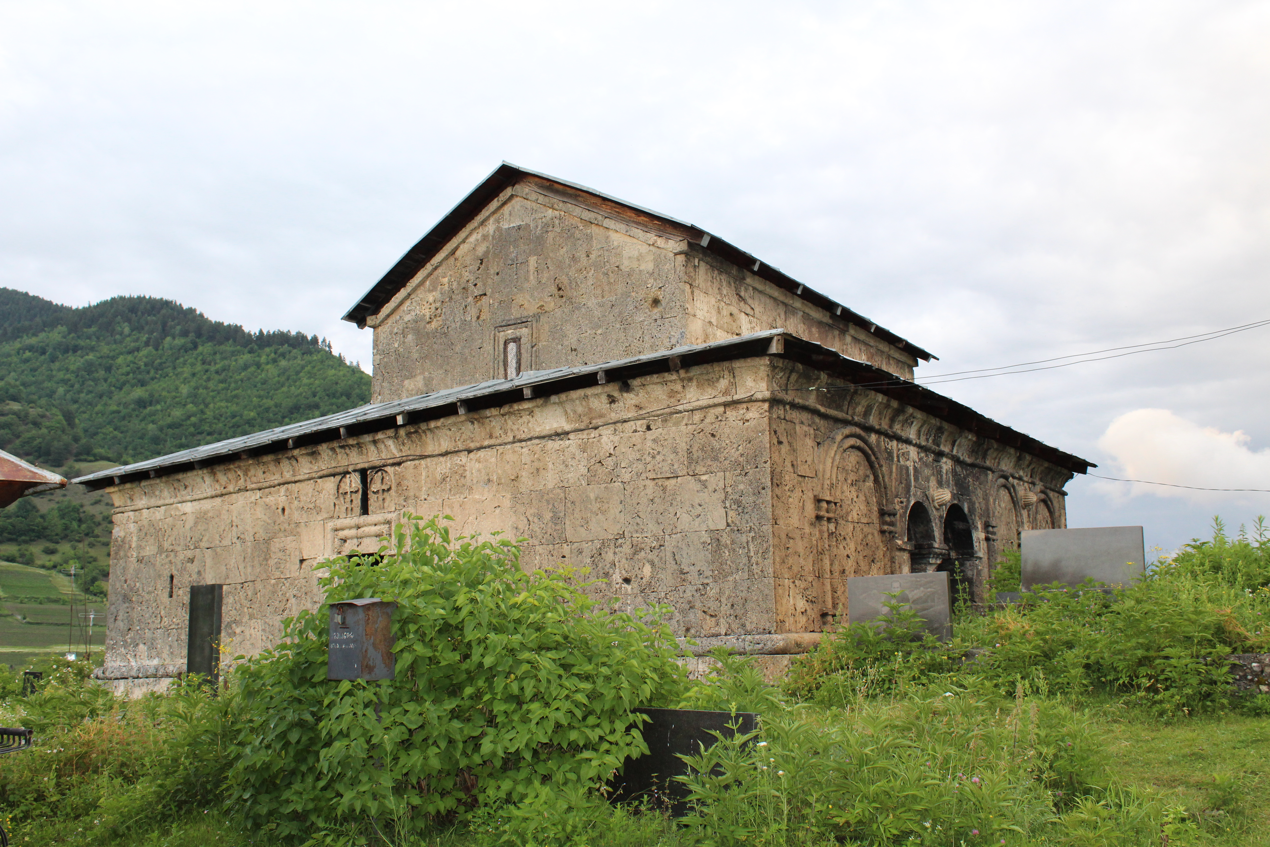 იოანე წინასწარმეტყველის ეკლესია „იან“